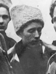 1919. Повстанцы советуются с батькой Махно. На переднем плане Петров, Горев, махно, Щусь